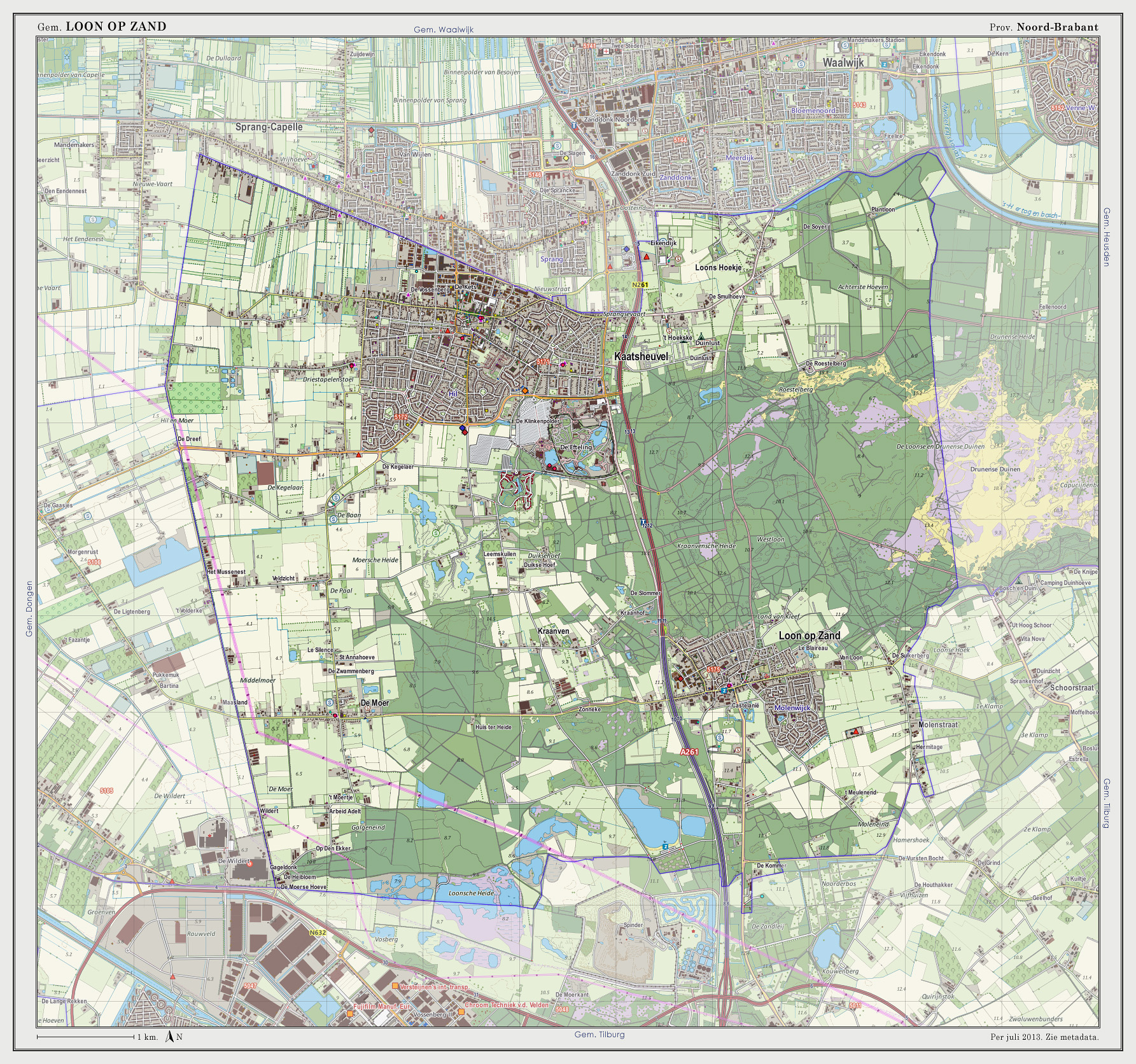 Topografische kaart van gemeente Loon op Zand (2013). Samengesteld door Jan-Willem van Aalst op basis van de GML open geodata van de BRT/Top10NL (basisregistratie Topografie, Kadaster 2011), vrijgegeven door Kadaster onder de Creative Commons BY licentie. Additionele gegevens uit BAG (8 juli 2013), uit de Open Street Map (9 juli 2013) en uit de Risicokaart. Peildatum kaartbeeld: 9 juli 2013. Zie ook Gemeentenatlas.nl Samenstelling en kleurenschema: Jan-Willem van Aalst, met QuantumGIS en Photoshop. Zie ook de Legenda.